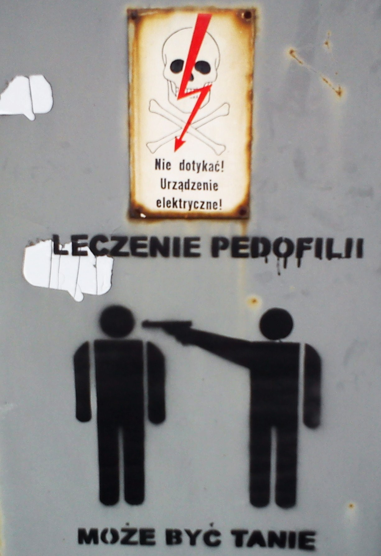 Graffiti in Poznań (Winiary).